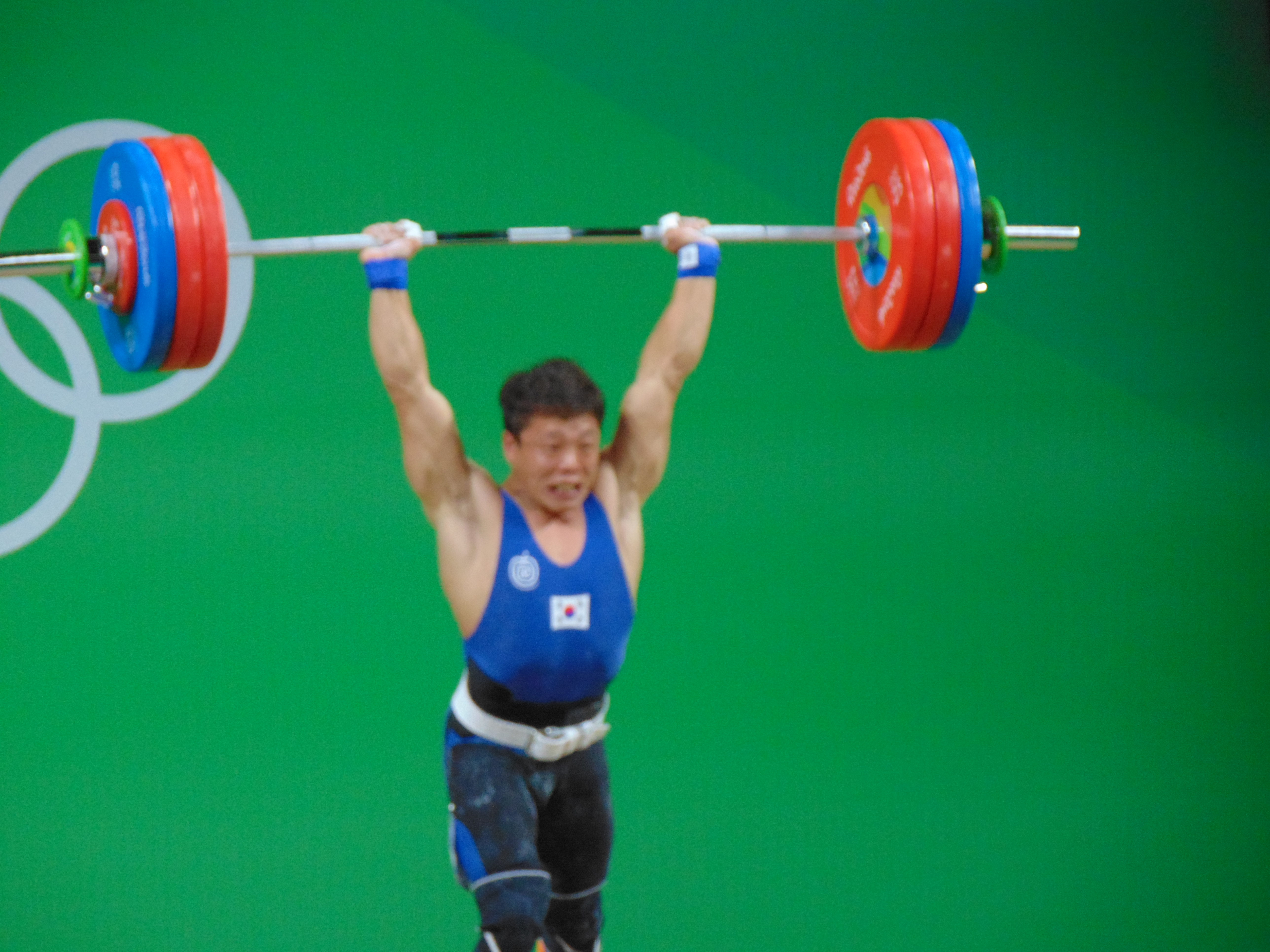 Rio 2016 - Weightlifting men's 69 kg